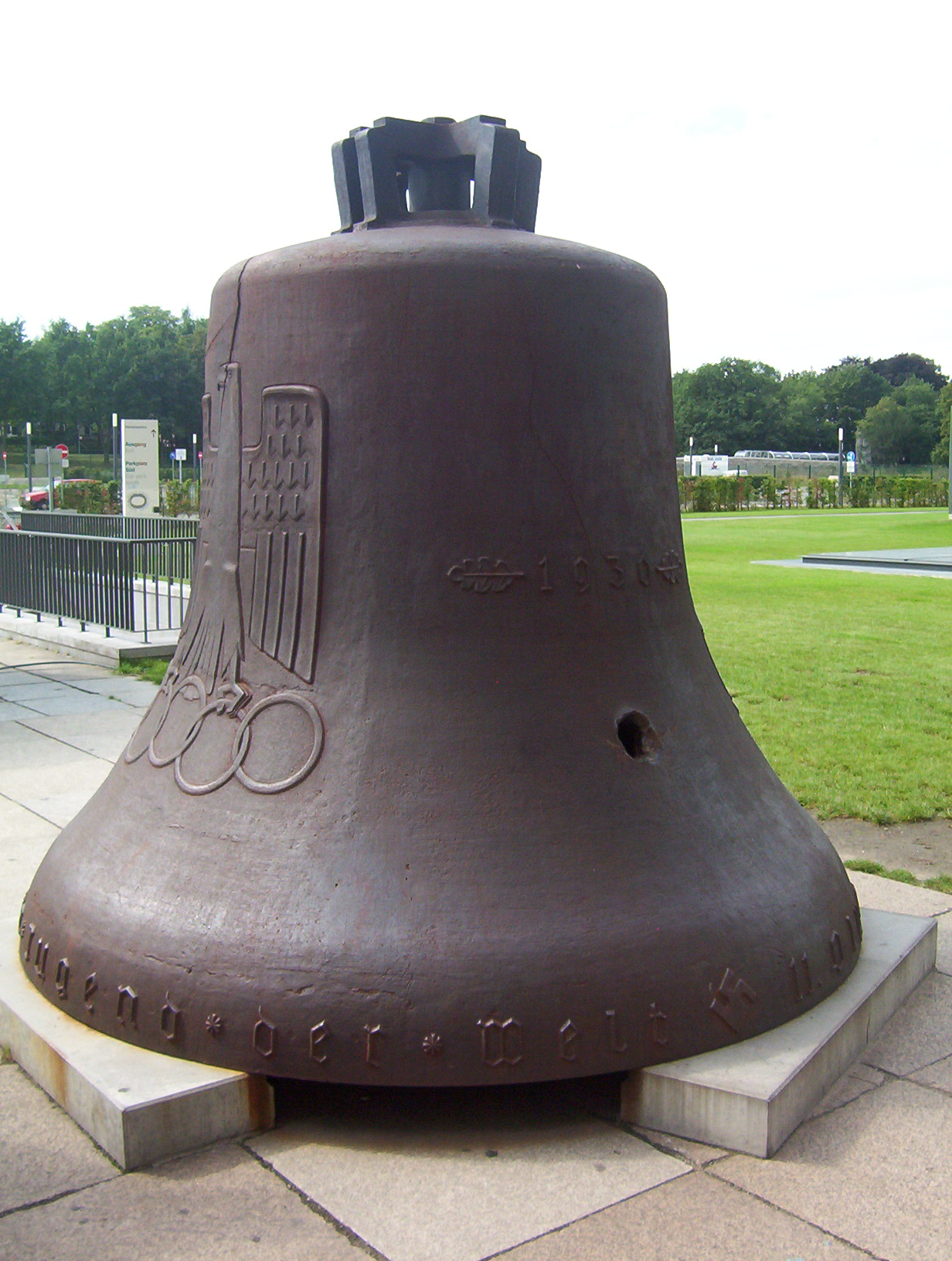 Diese Glocke wurde zur Eröffnung der Olypischen Spiele 1936 geläutet. Sie befindet sich heute außerhalb des Olympiastadions. Das Hakenkreuz wurde leicht verfremdet.